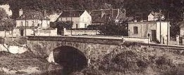 Extrait d'une ancienne photographie du pont de La Motte, ouvrage d'art franchissant les deux rives de la Loire entre les communes de La Riche et Fondettes, près de Tours, Indre-et-Loire.